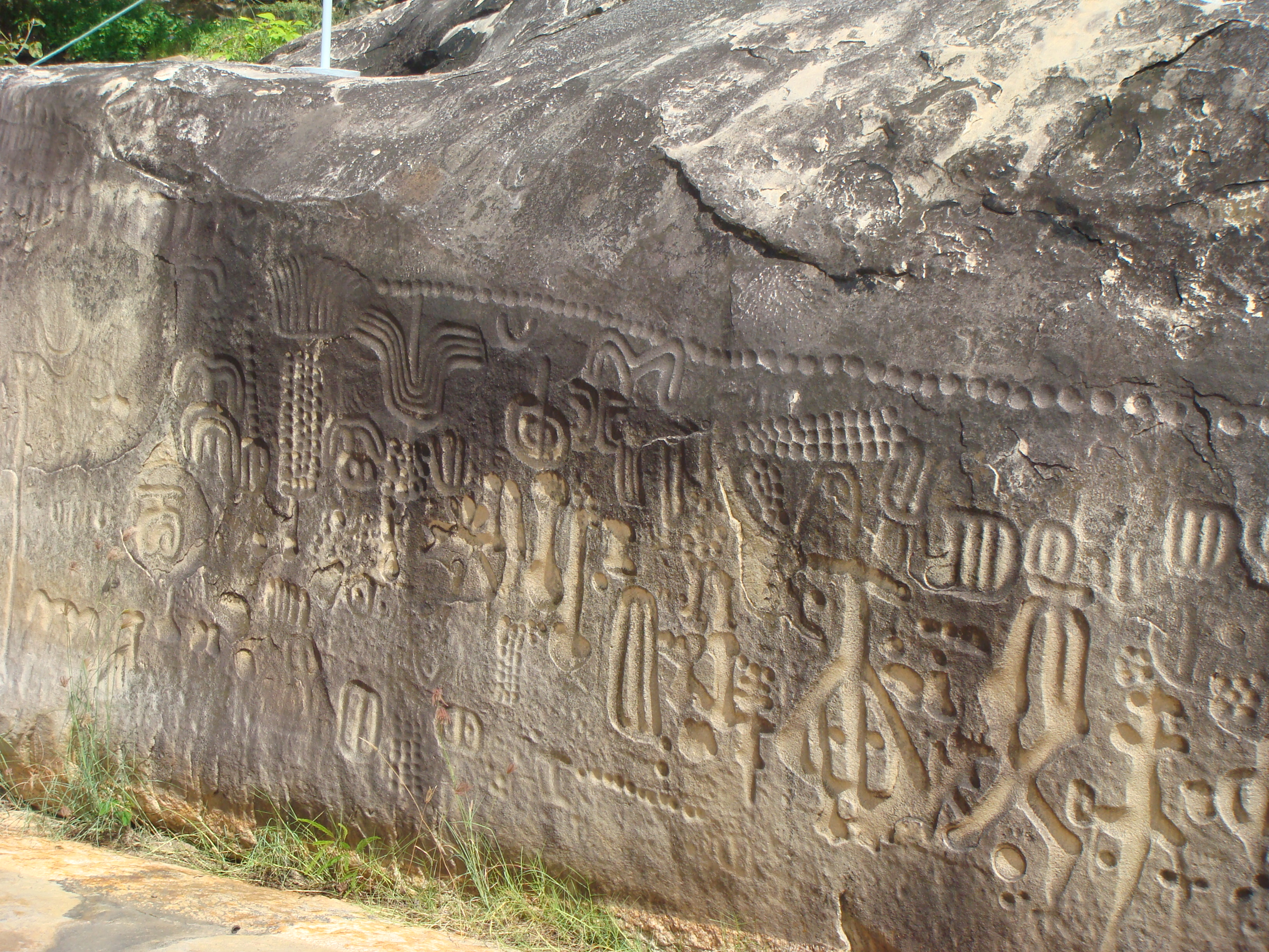 Pedra do Ingá - PB - Brasil